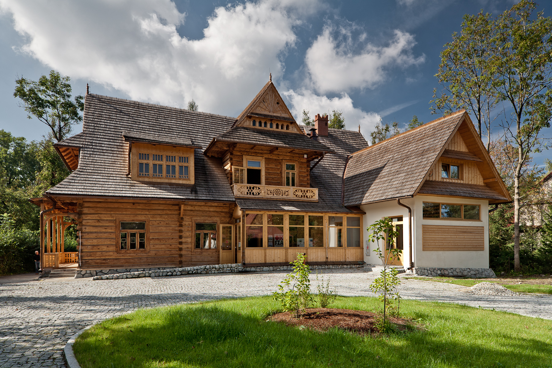 Willa „Oksza”, Zakopane - widok na tylną elewacje